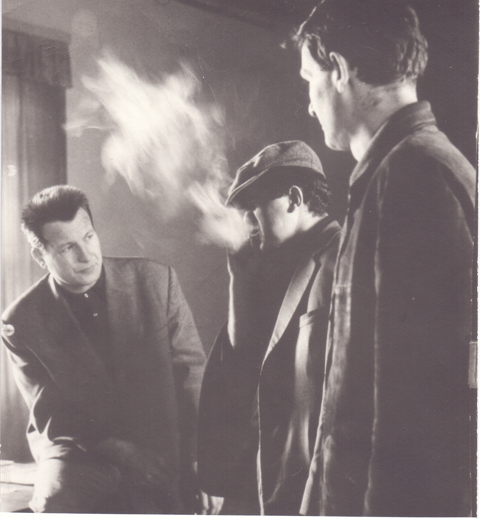 Marjan Rožanc, Topla greda, Oder 57. Janez Hočevar (Leopold), Marjan Hlastec (Stari, direktor) in Boris Juh (Jalovic, obratni inžinir).